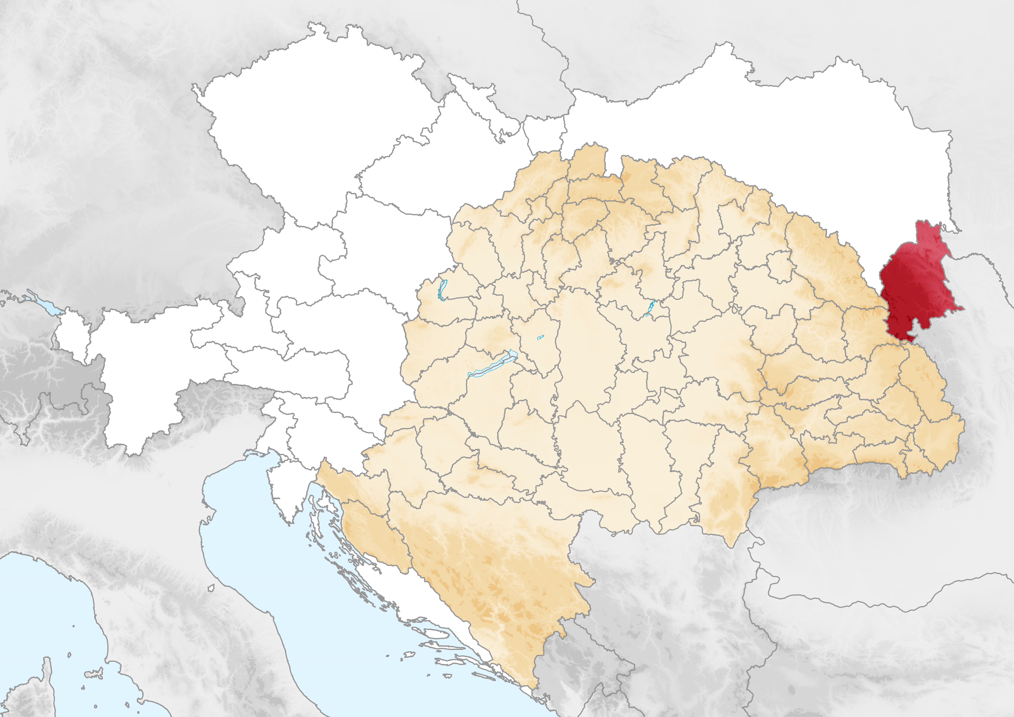 Carte de la Bucovine dans l'empire d'Autriche (1914)